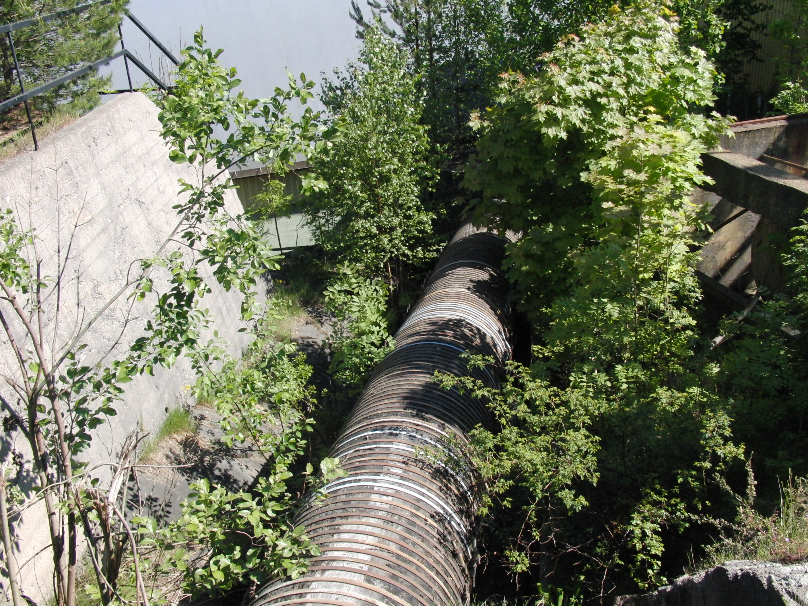 Helle Bruk kraftverk rørgate